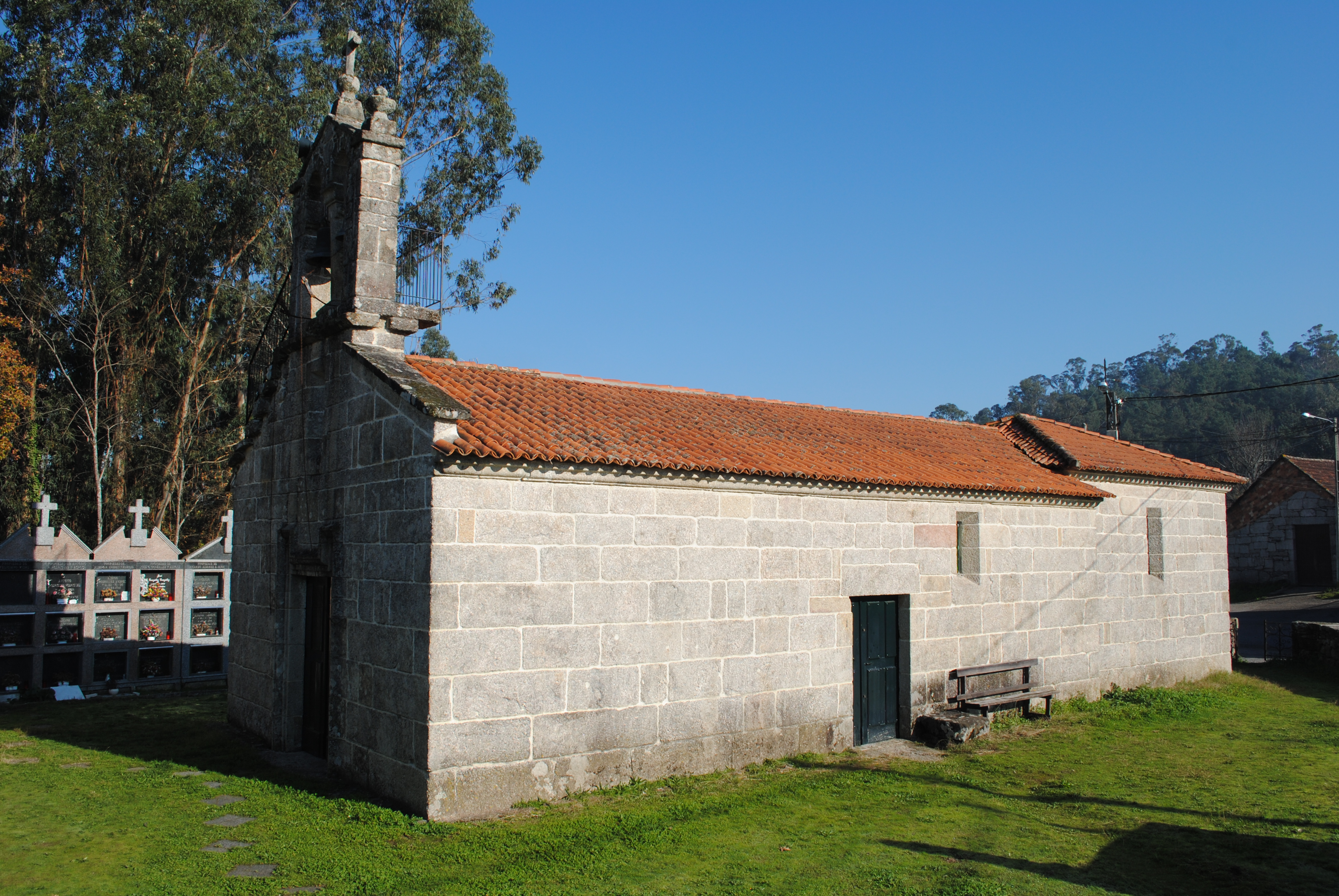 Salvaterra de Miño, Lourido